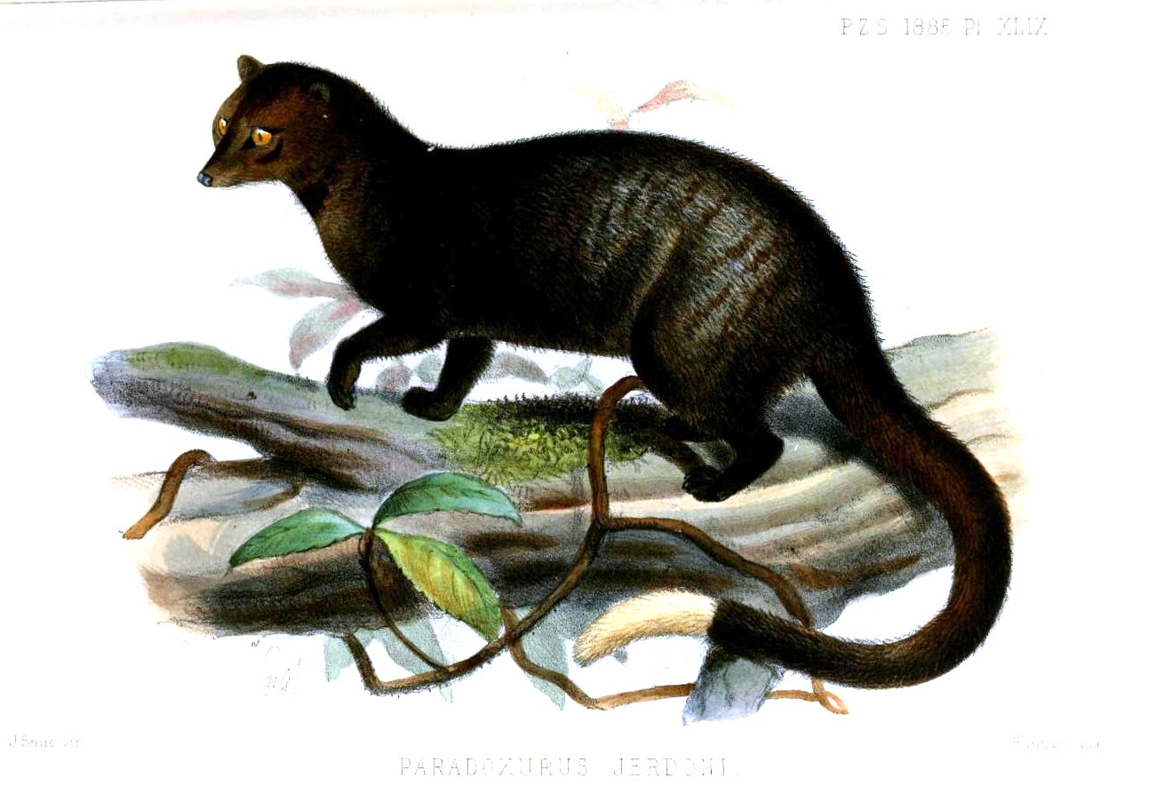 Paradoxurus jerdoni, painting by Joseph Smit